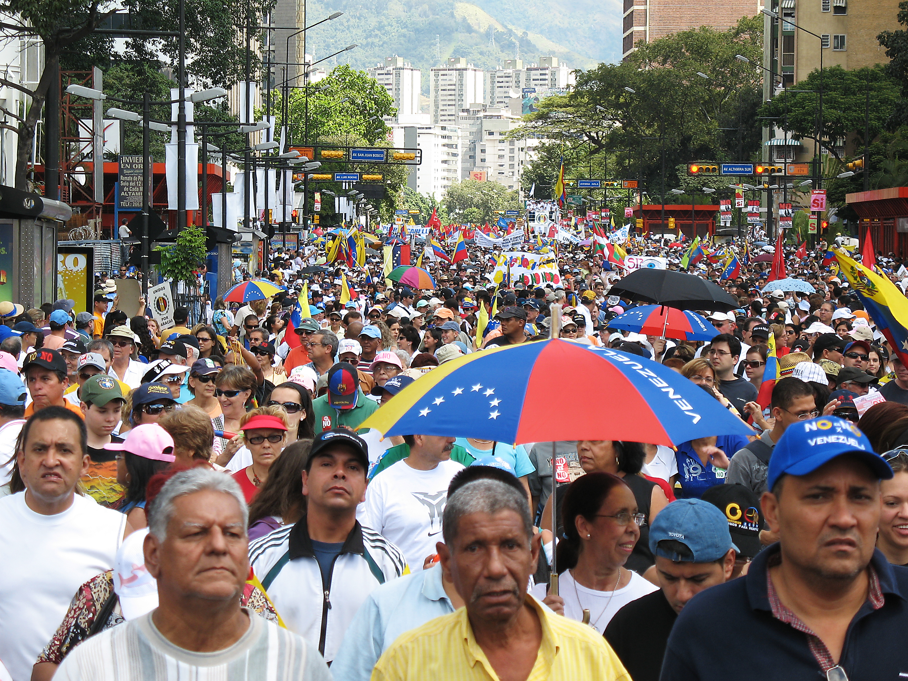 Venezolanos durante una marcha politica en Caracas.